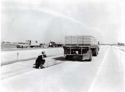 Tragfähigkeitsmessung mit einem beladenem LKW als Gegengewicht während des AASHO Road Test